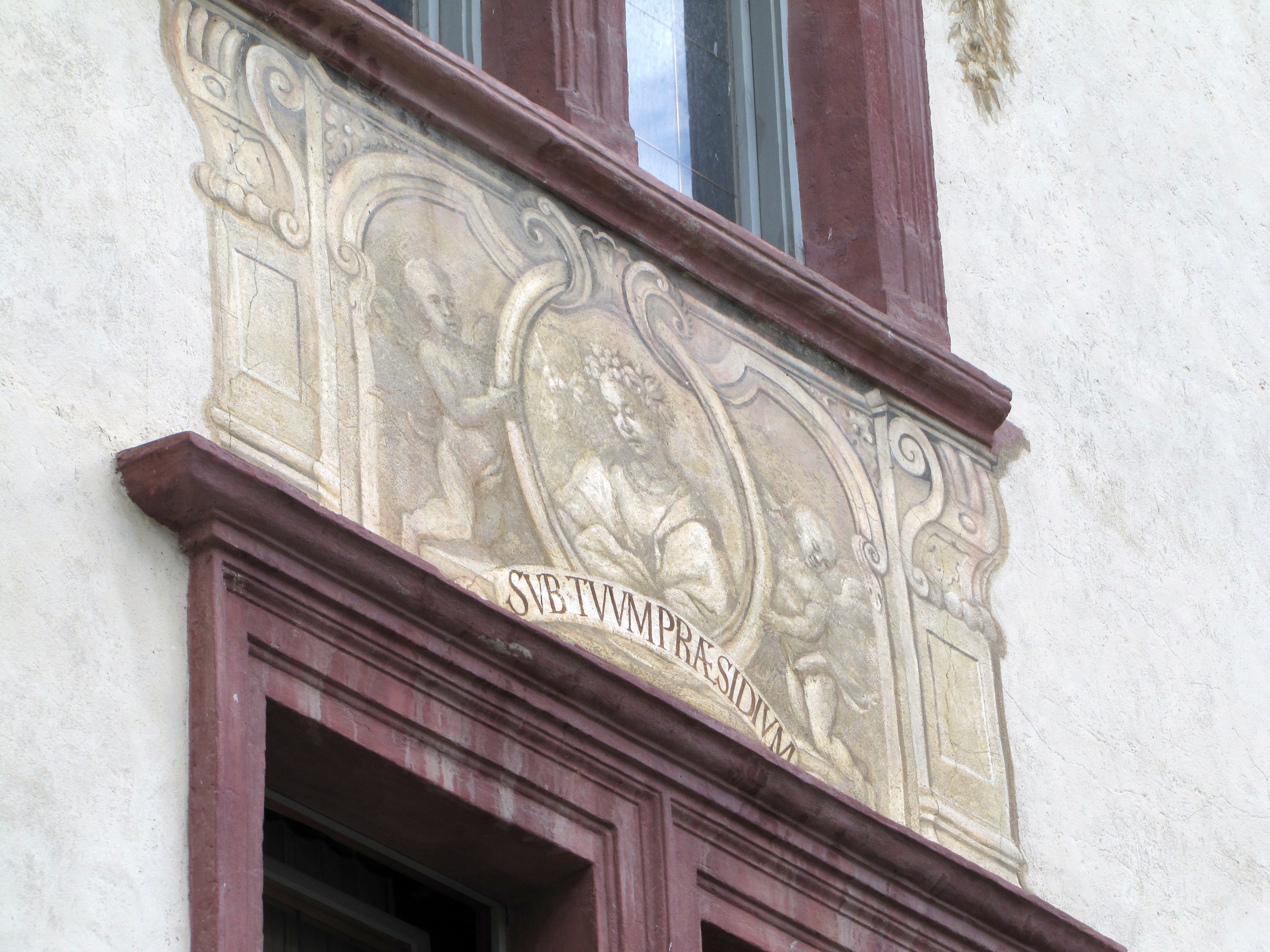 Schlanderegg